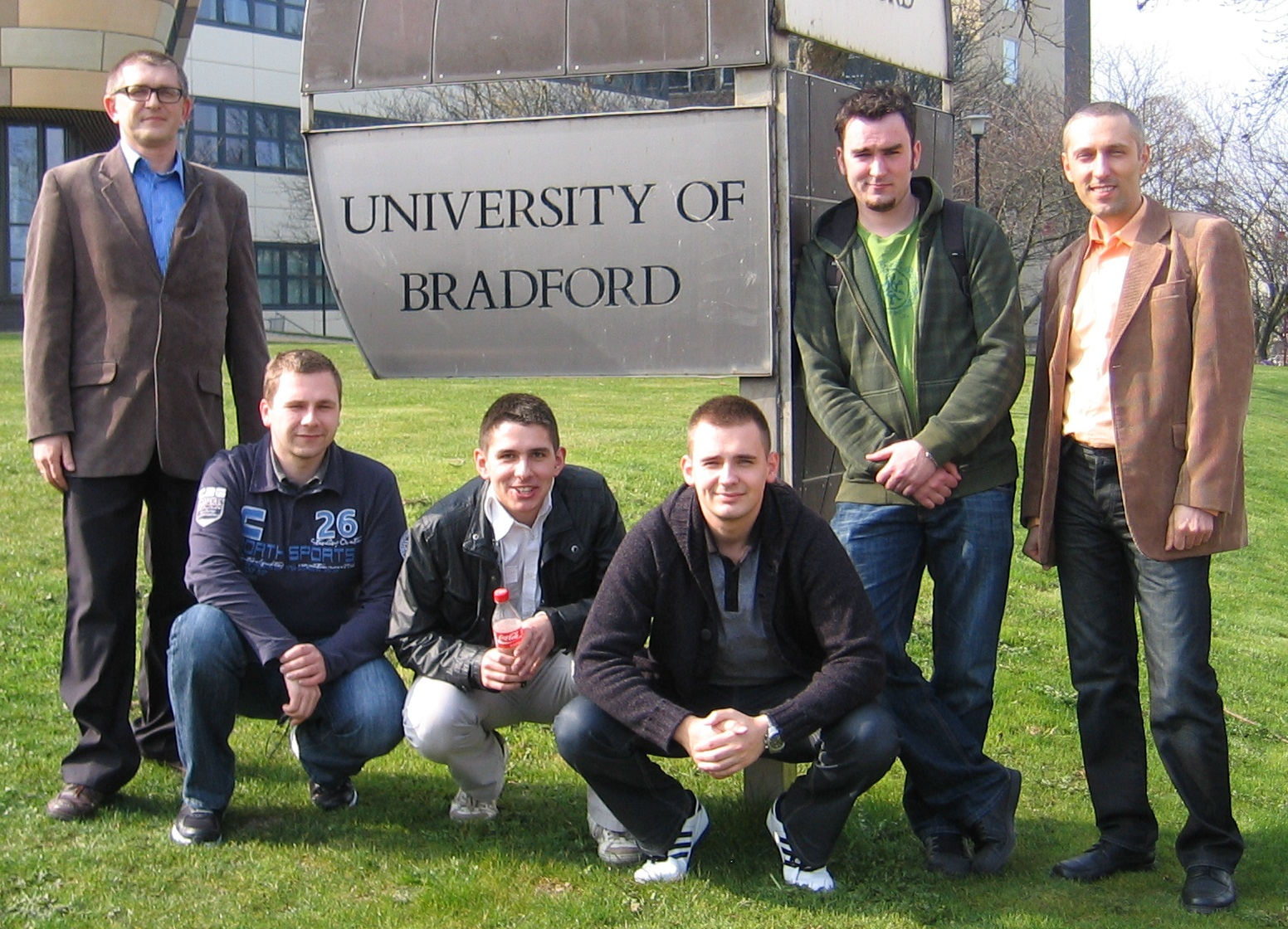 Krzysztof Górski (pierwszy od prawej) podczas realizacji programu Erasmus w University of Bradford